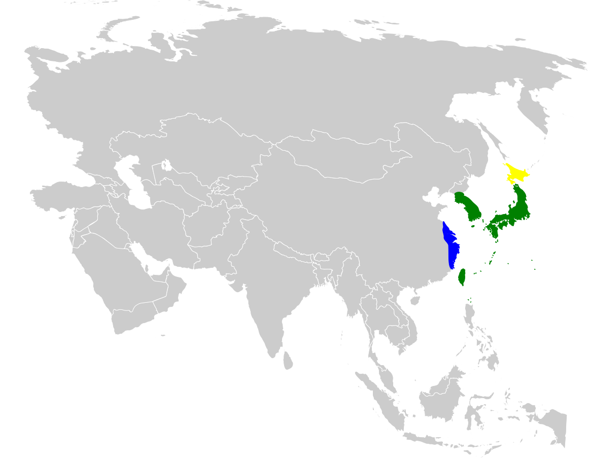 Hypsipetes amaurotis distribution map